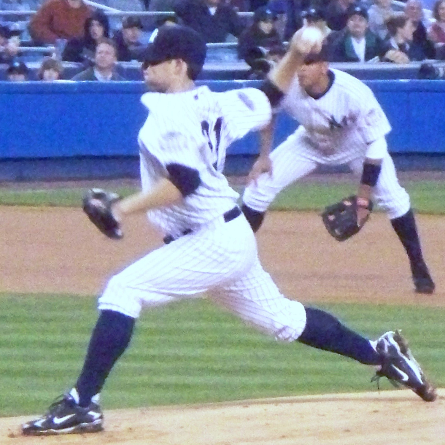 Ian Kennedy